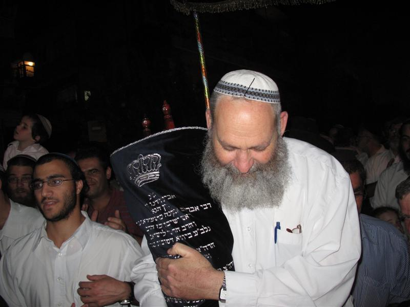 ישיבת מרכז הרב.